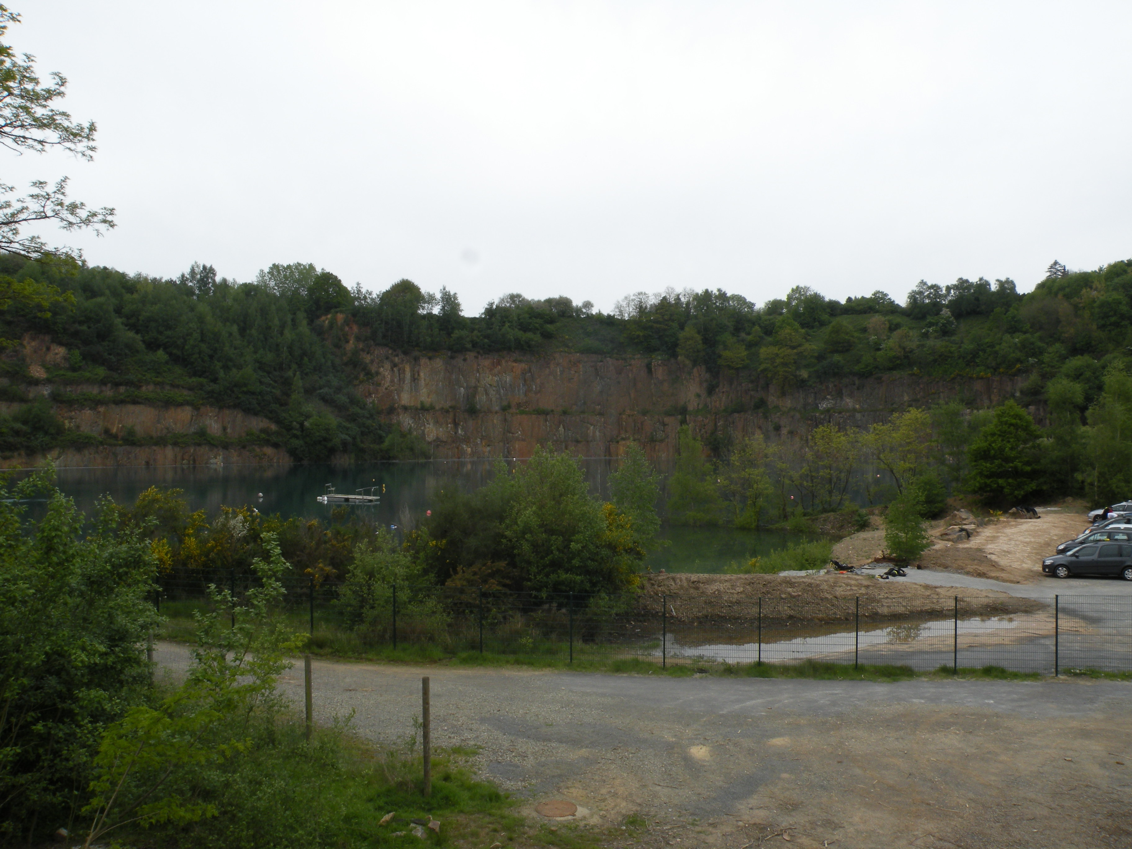 Plan d'eau du Rocher Coupé à Fougères, Ille-et-Vilaine, France